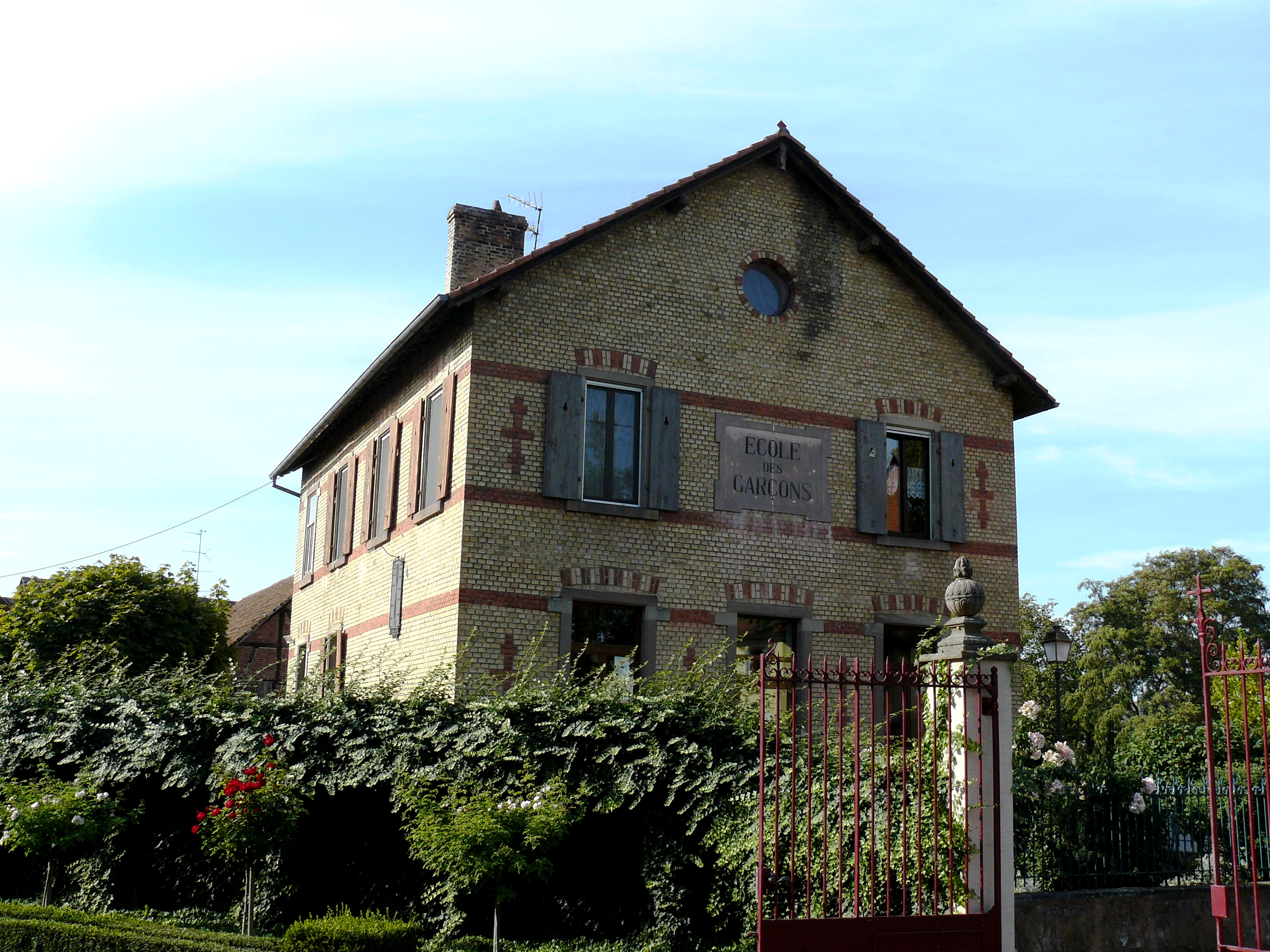 École de garçons d'Ohnenheim, 35 rue de l'église